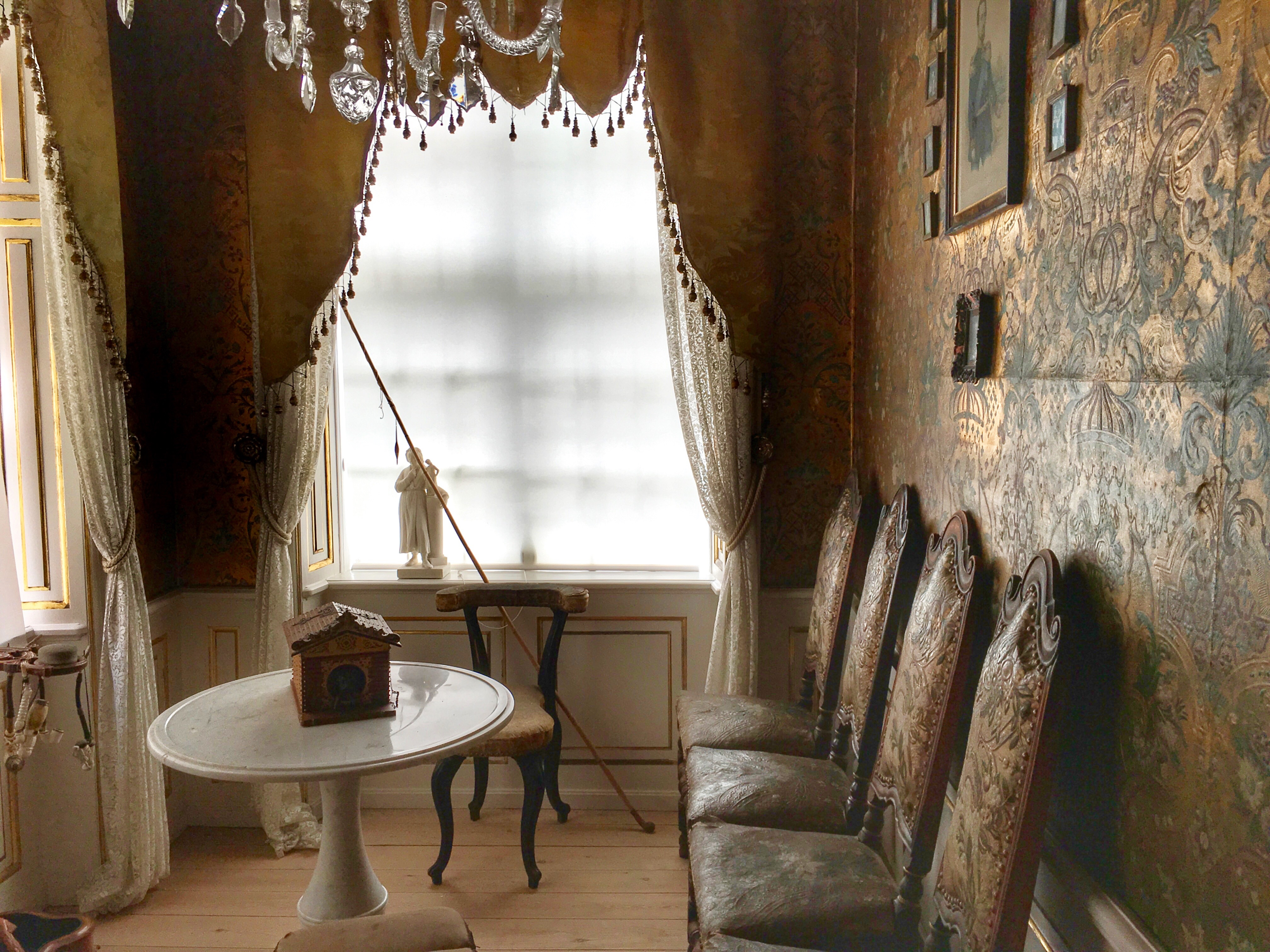 Tårnværelse på Jægerspris Slot hvorfra kong Frederik VII fiskede i voldgraven. Til venstre skimtes stativ med piber. Jægerspris, Sjælland